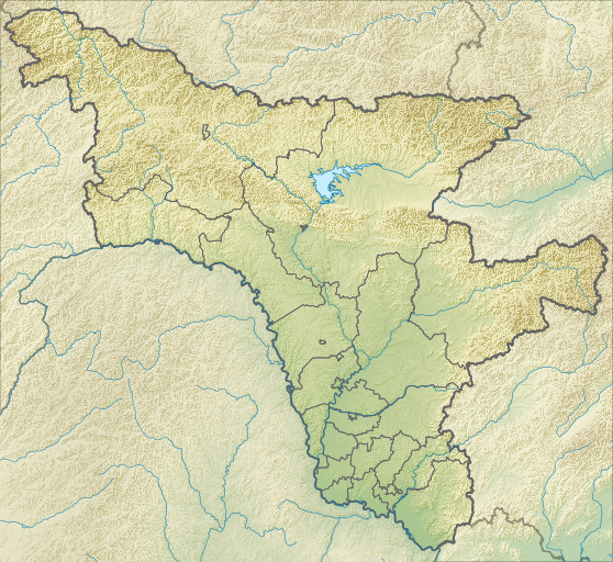 Физическая карта Амурской области, Россия. Проекция: Меркатор Координаты для GMT: -R119.5313/135.0660/48.6765/57.1839 Инструменты: GMT, Inkscape This map may be incomplete, and may contain errors. Don't rely solely on it for navigation.